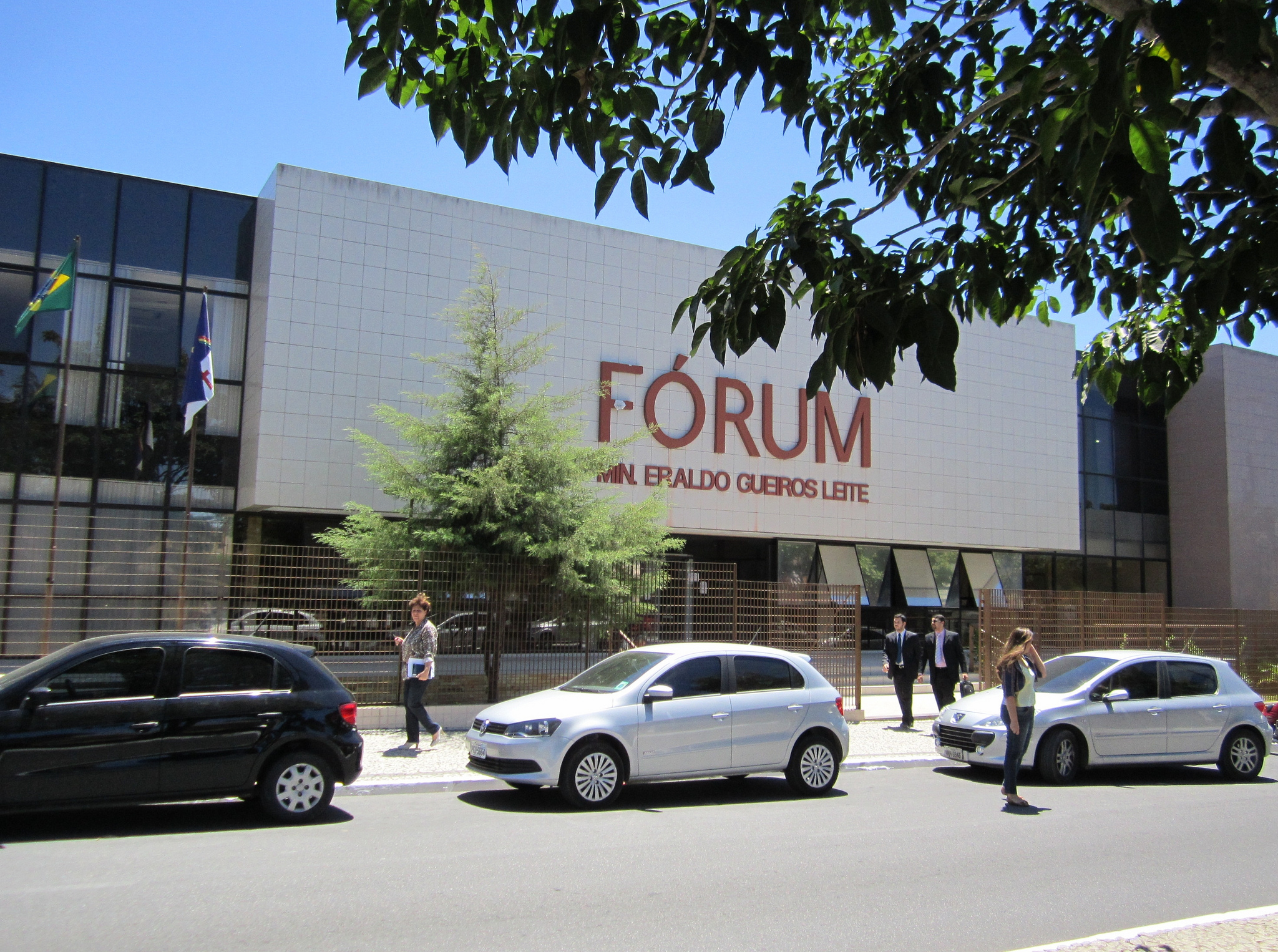 Fórum - Garanhuns, Pernambuco, Brasil